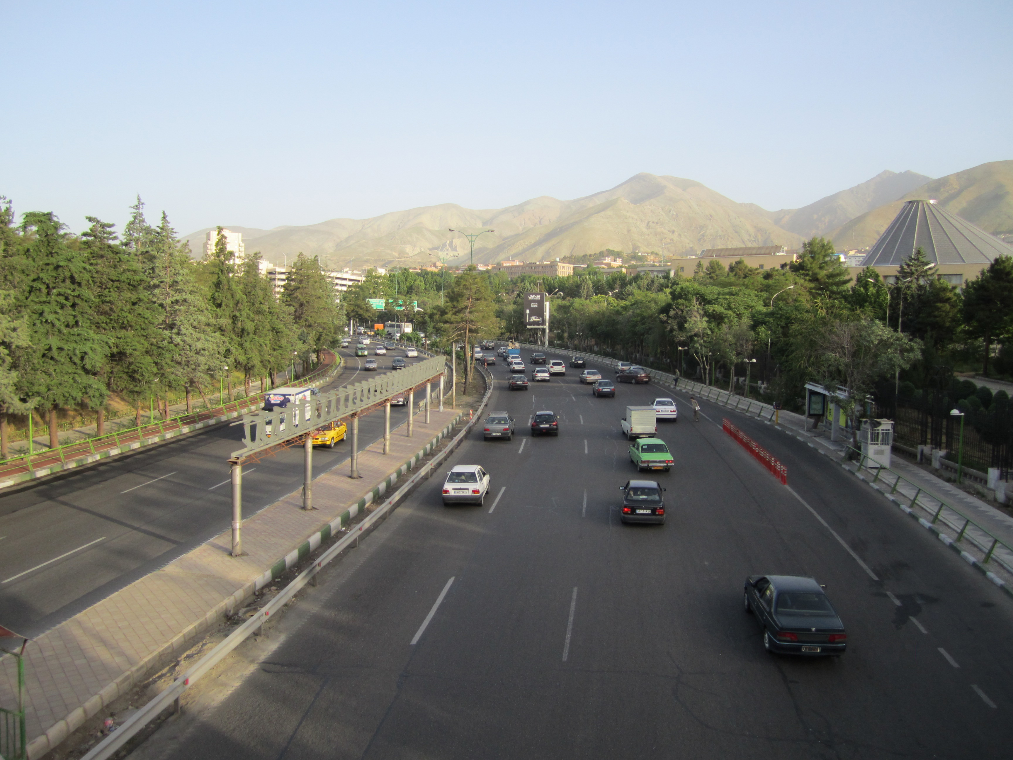 بزرگراه چمران